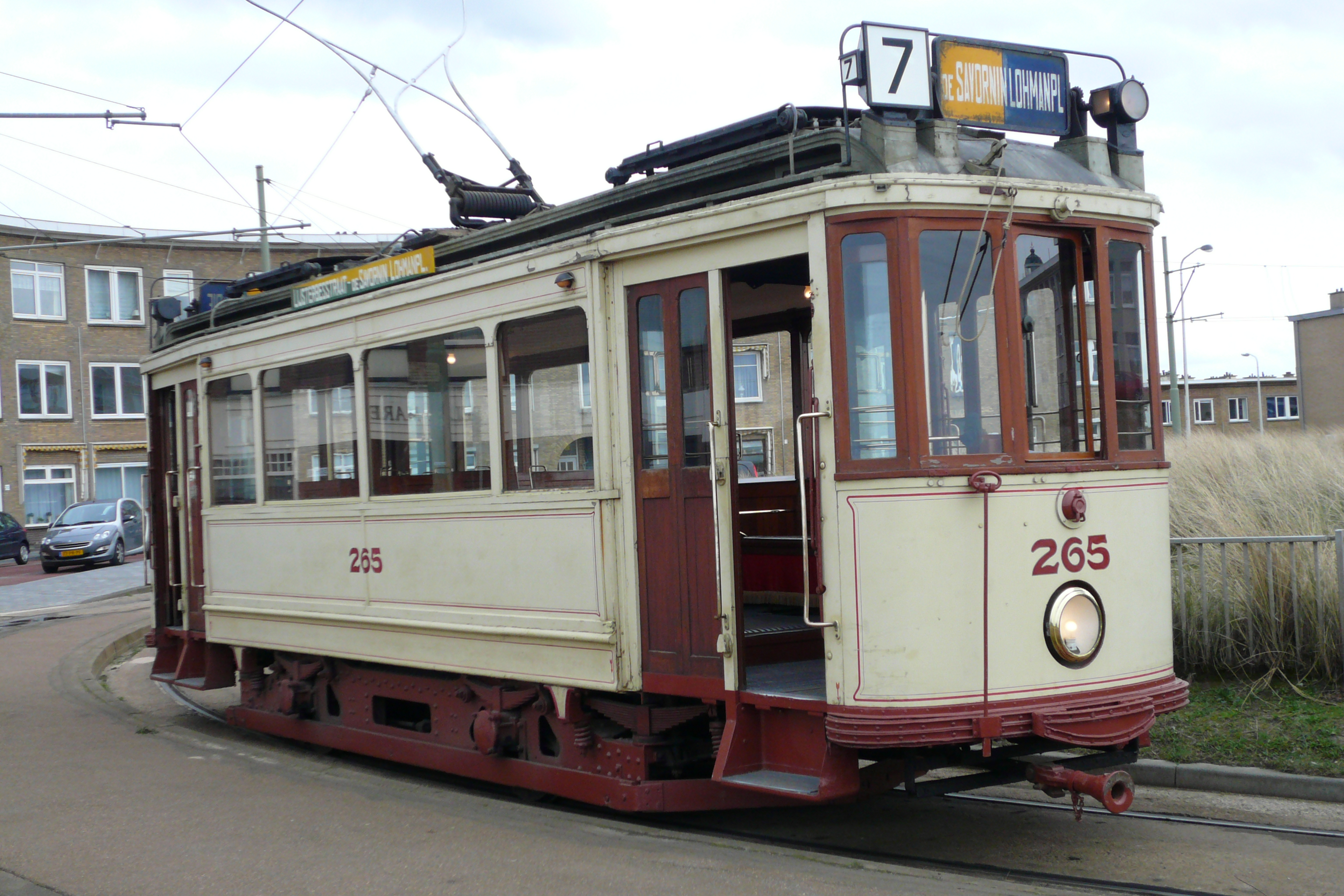 HTM tram 265 van het Haags Openbaar Vervoer Museum als lijn 7 in de eindlus van lijn 11 te Scheveningen Haven